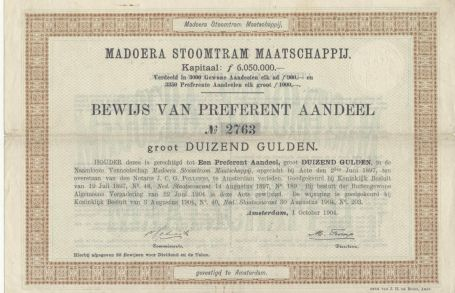 Madoera Stoomtram Maatschappij, 1 oktober 1904, Preferent aandeel, f 1000,00